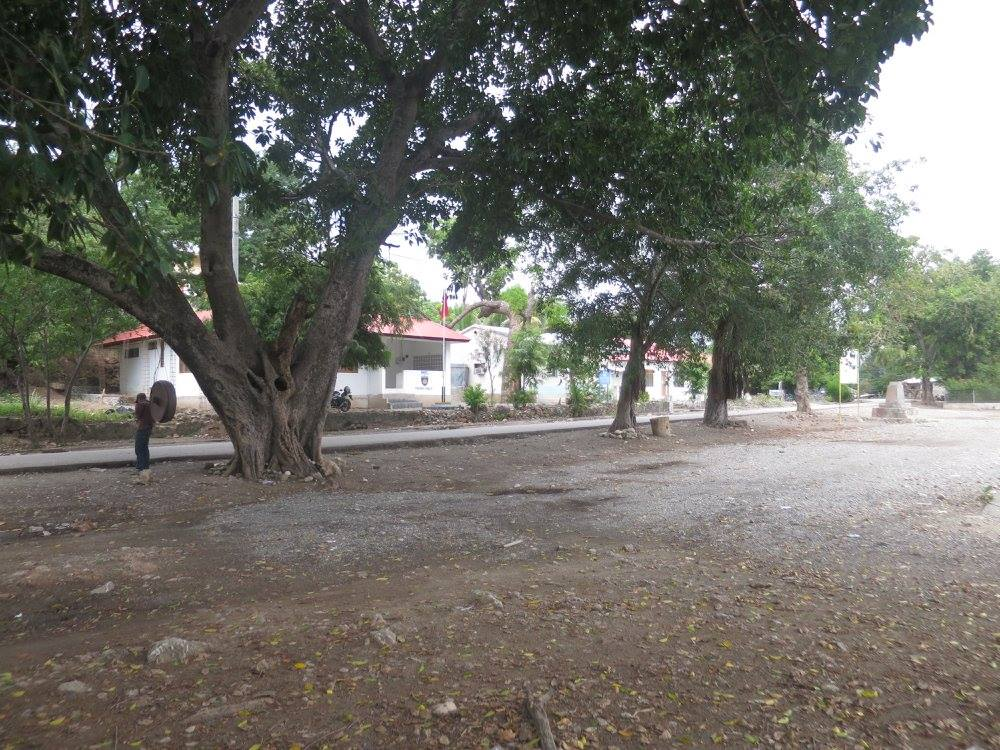 Largo da Igreja de Vemasse